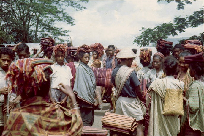 Os tradicionais panos timores-os "tais" em tetum